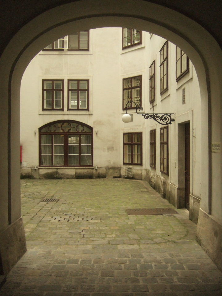 Wien: Eingang und Hof des Pasqualati-Hauses, in dem Beethoven wohnte